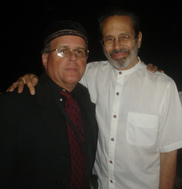 Ambos en la gala de "Cubadisco 2012"